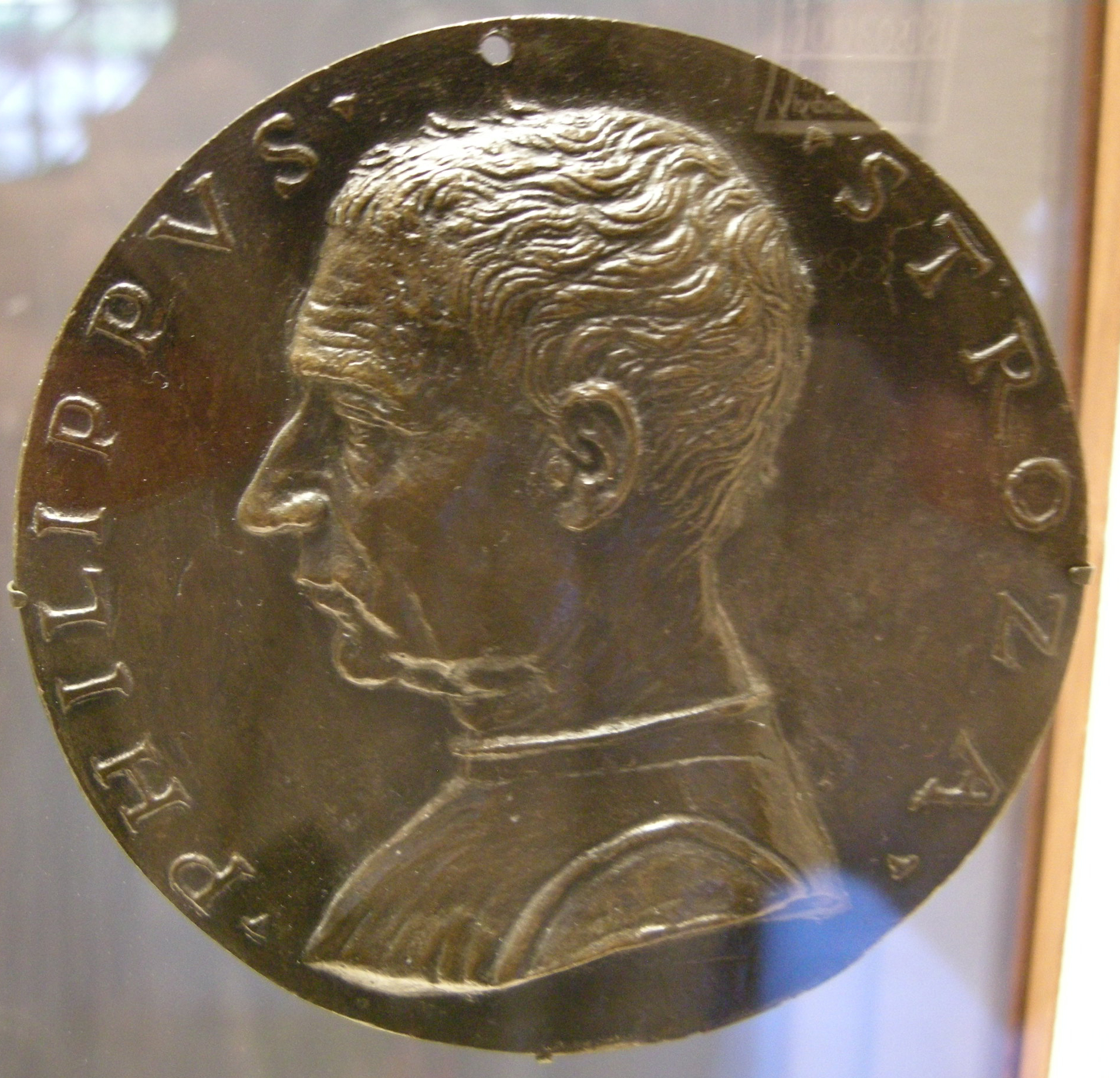 filippo strozzi (1426-91), recto